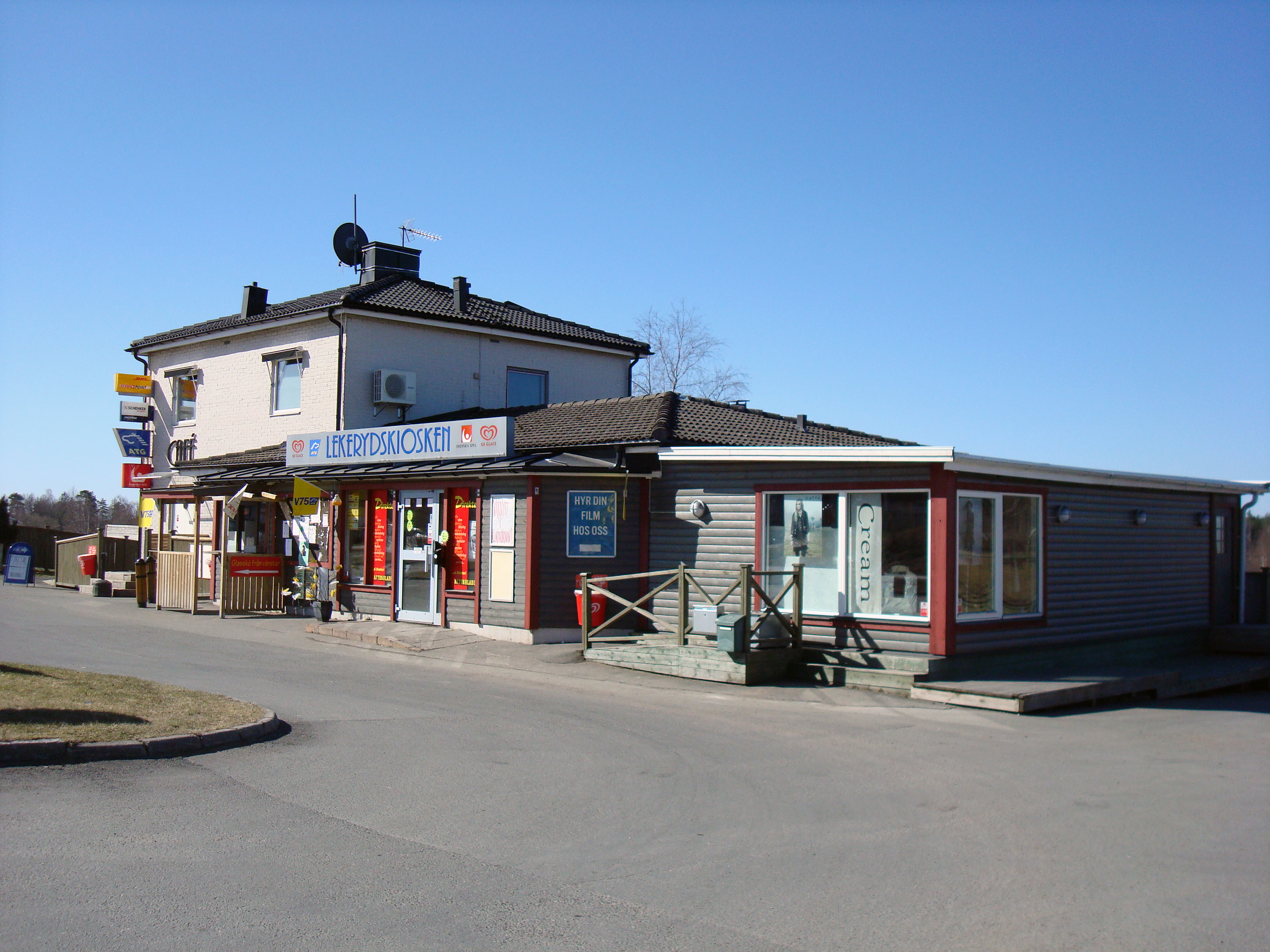 Skolan i Lekeryd